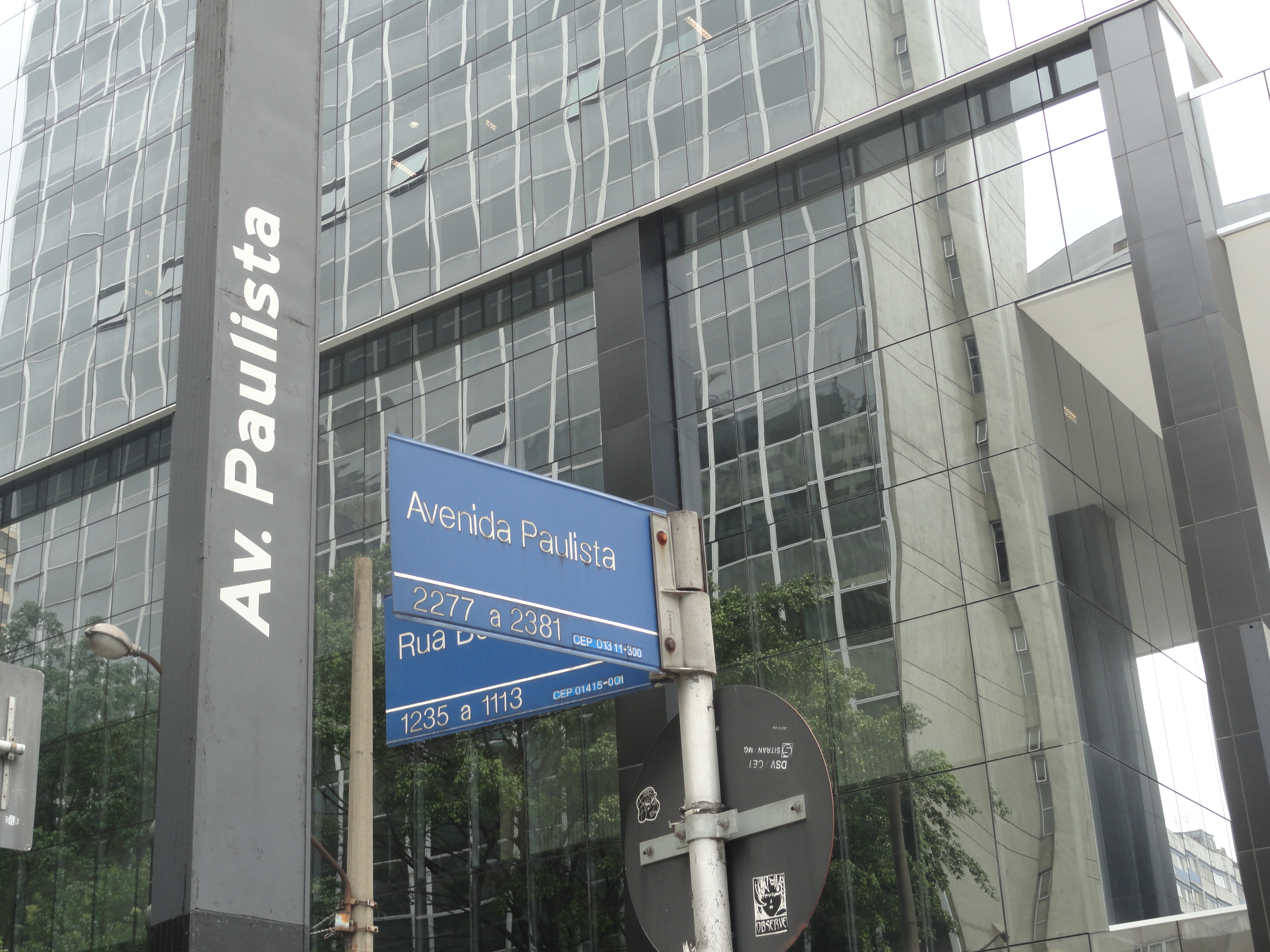 Avenida Paulista